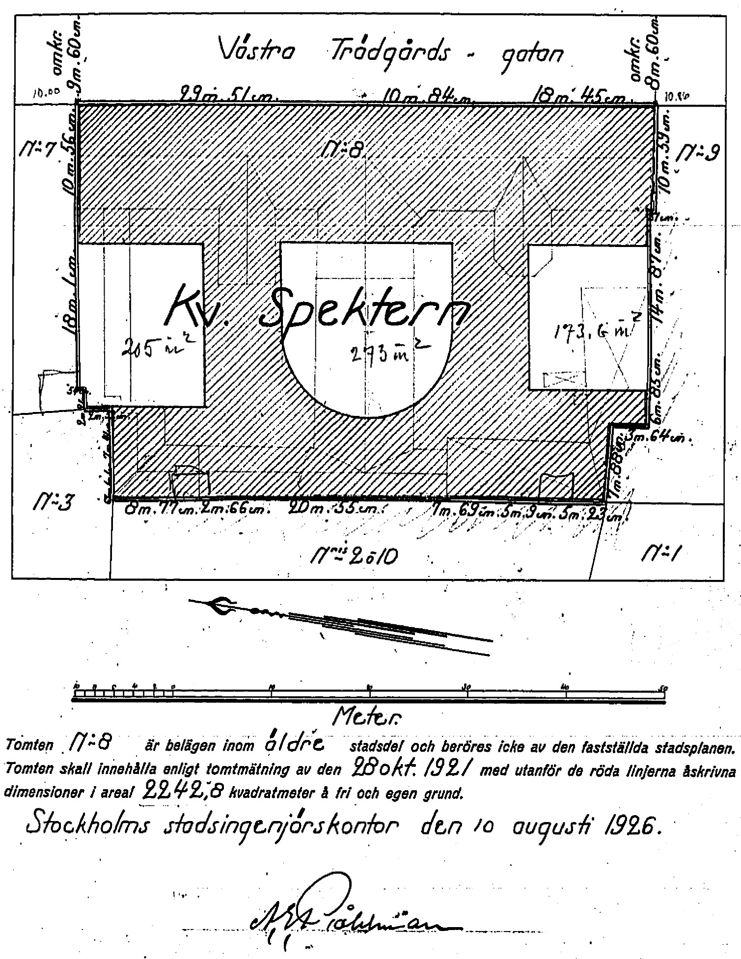 Nybyggnadskarta för Spektern 8 (Tändstickspalatset)